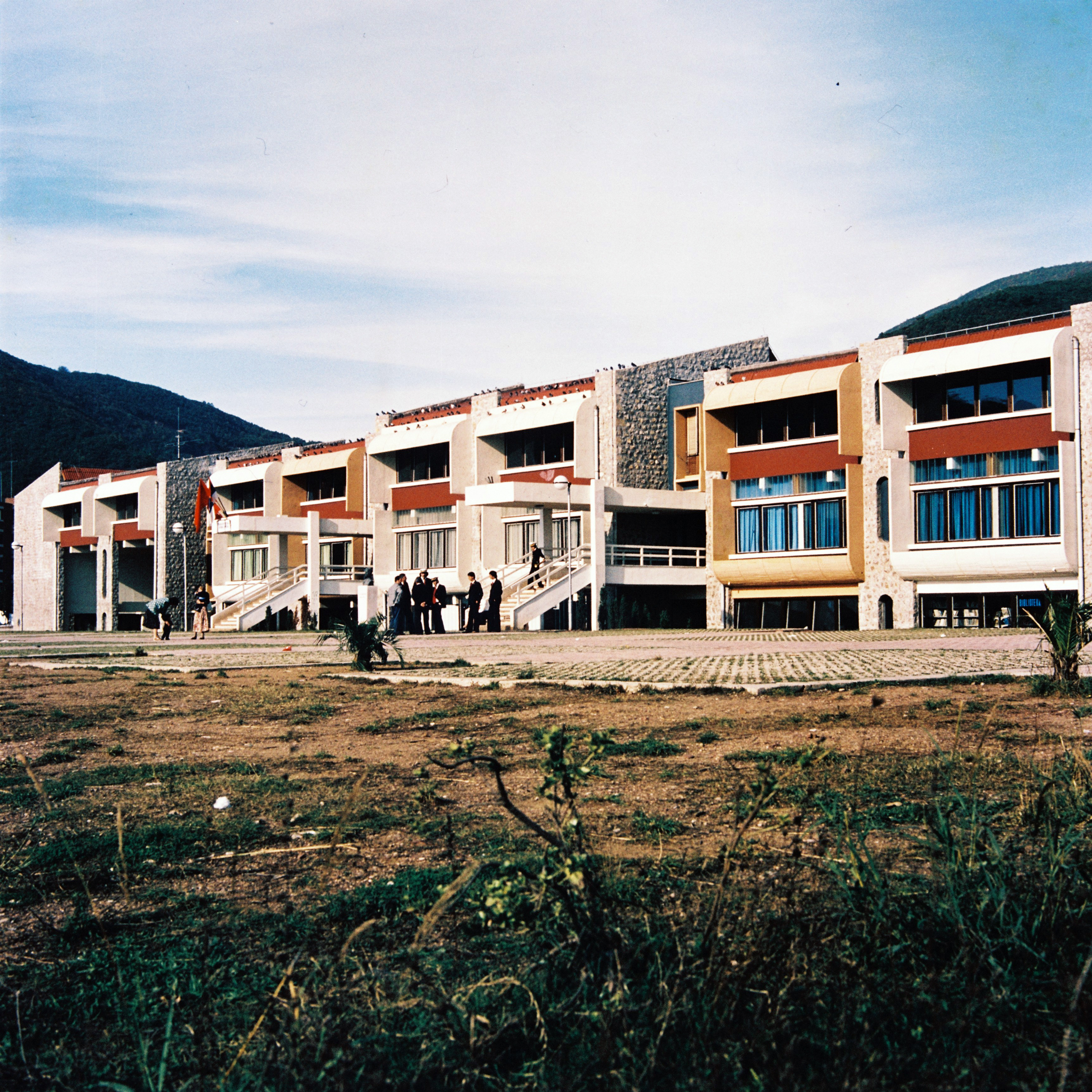 Osmogodišnja škola u Budvi, arh. Aleksandar Keković